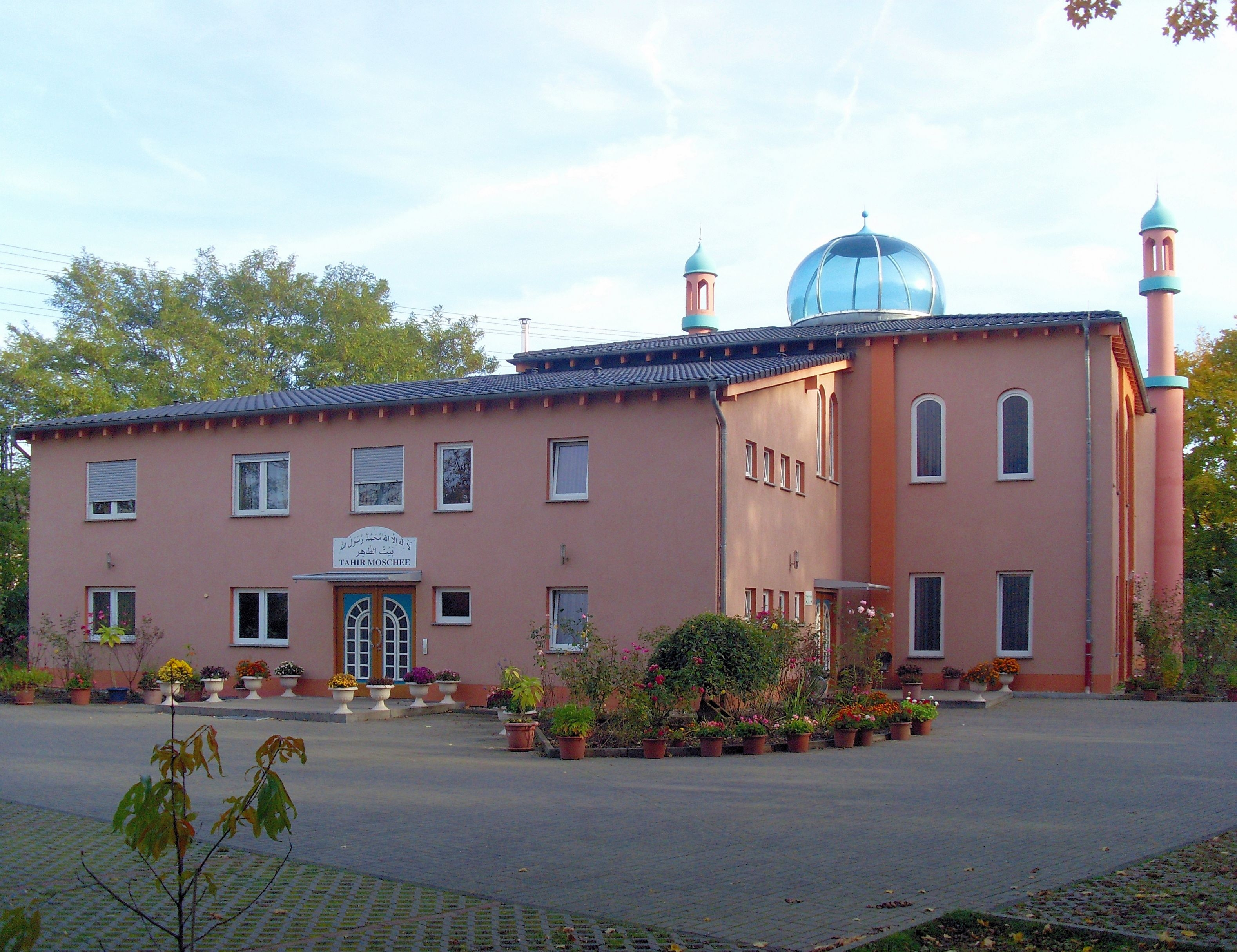 Tahir-Moschee in Koblenz erbaut von der Ahmadiyya Muslim Jamaat